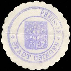 Sealing stamp Title: Stadt Usingen / Preussen Description: Siegelstempel, blau, weiß Place: Usingen / Preussen size: 4 cm